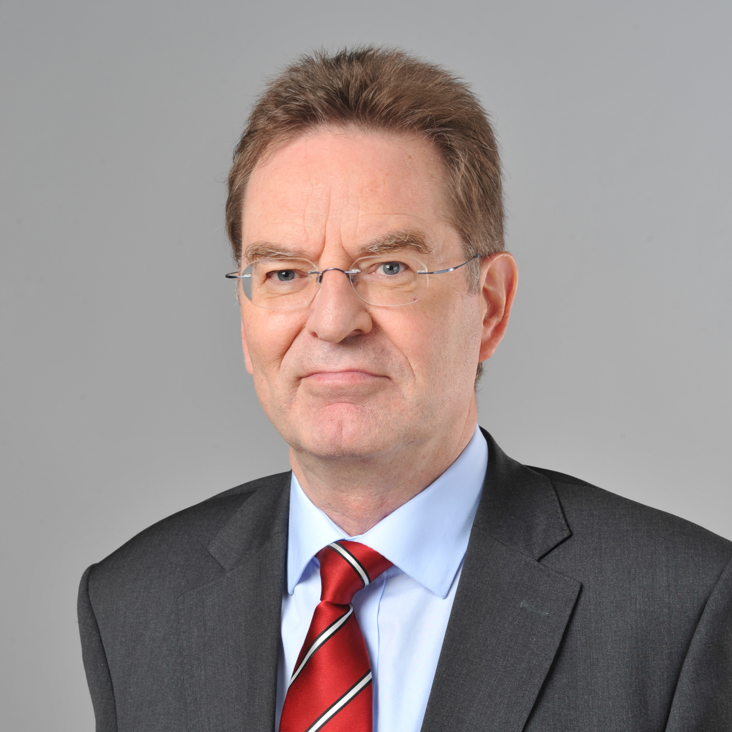 Landtagsprojekt Nordrhein-Westfalen 27. - 29. November 2013 Helmut Dockter